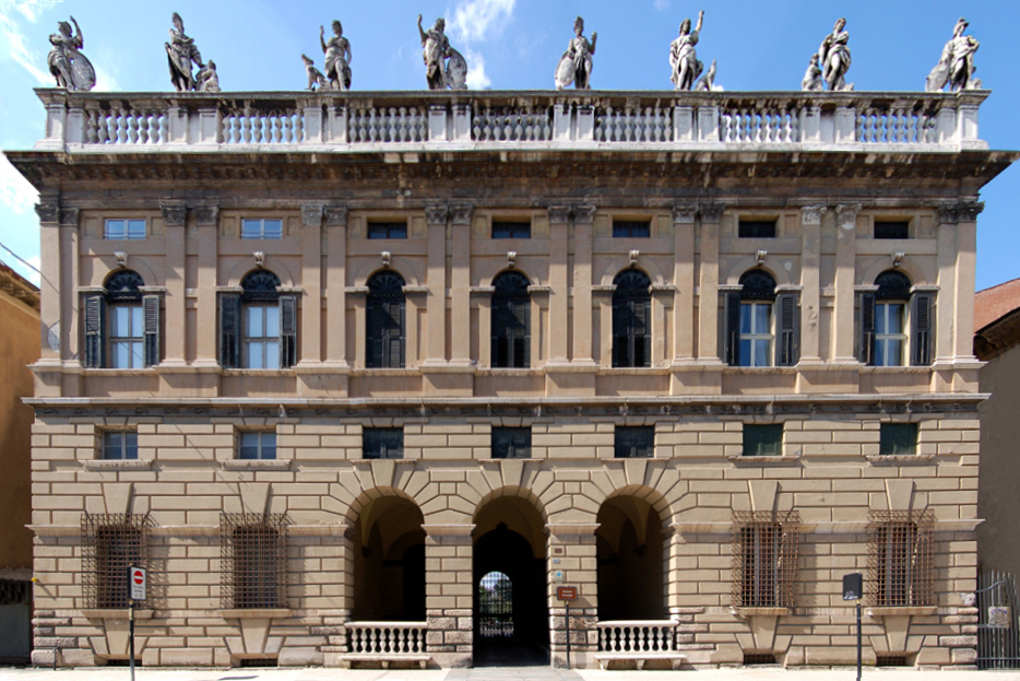 Fotografia del palazzo Canossa a Verona.